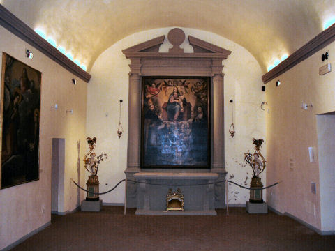 Certaldo, Museo Arte Sacra, la Compagnia